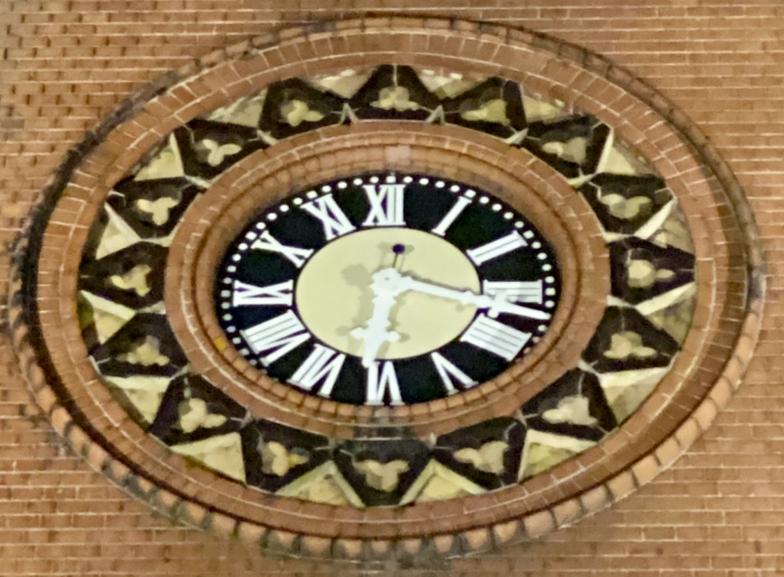 Zifferblatt Christuskirche Hamm Südseite Dezember 2019